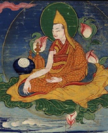 Sanggye Yeshe, b.1525 - d.1591, Geluk Lama